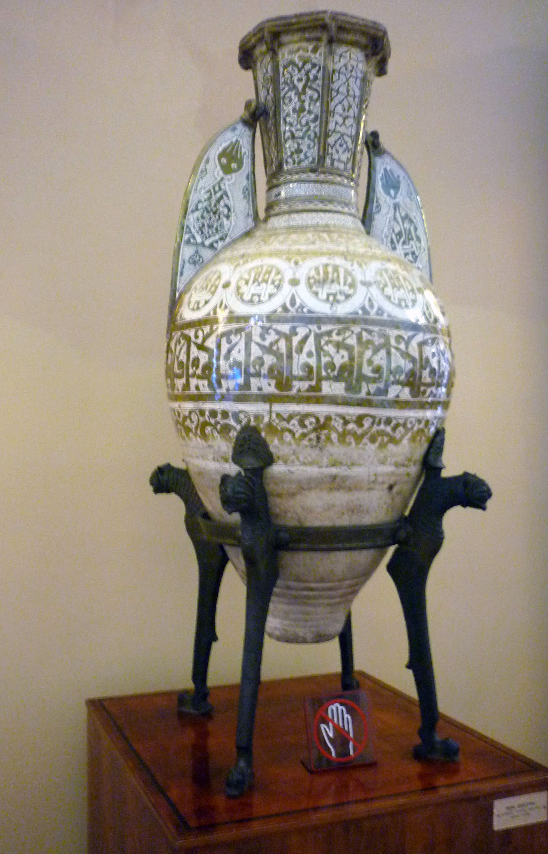 Vaso de Fortuny, de cerámica hispano.morisca con reflejos metálicos procedente de Málaga (España) datado del siglo XIV conservado en el Museo del Ermitage ( San Petersburgo)